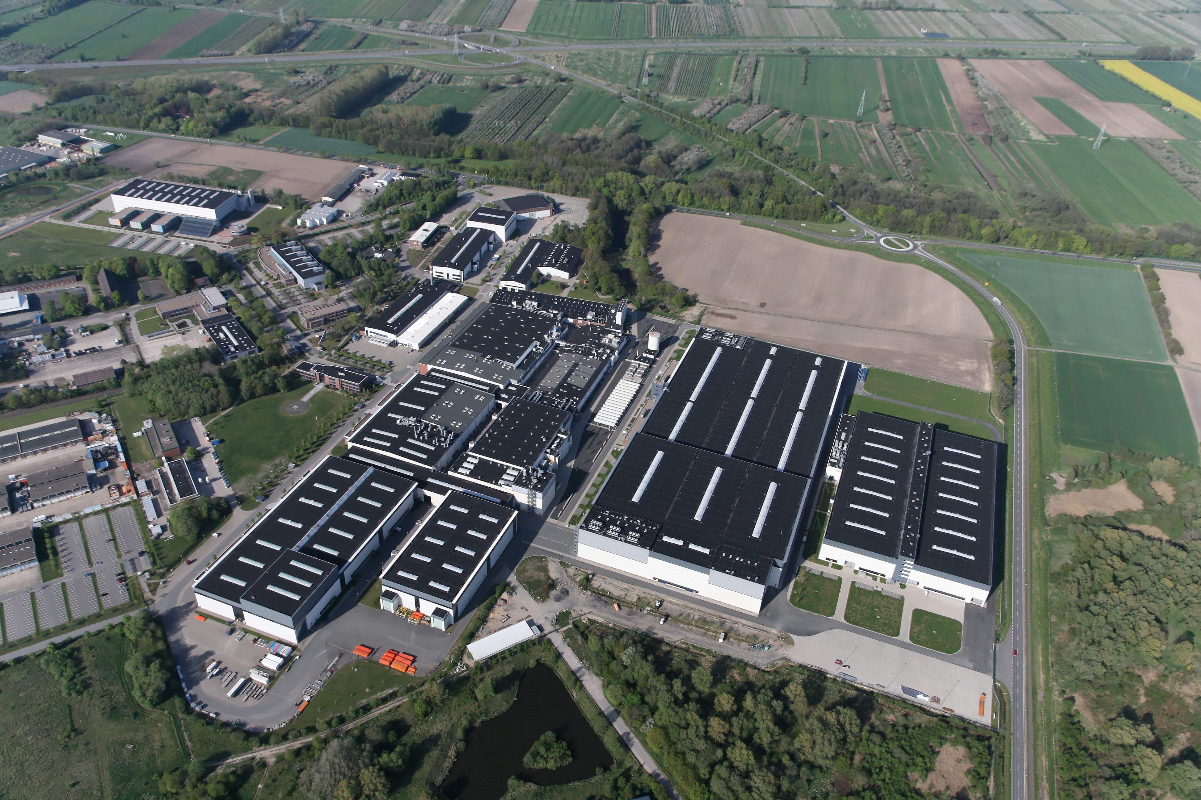 Luftaufnahme: das Airbus-Werk in Stade und Agathenburg